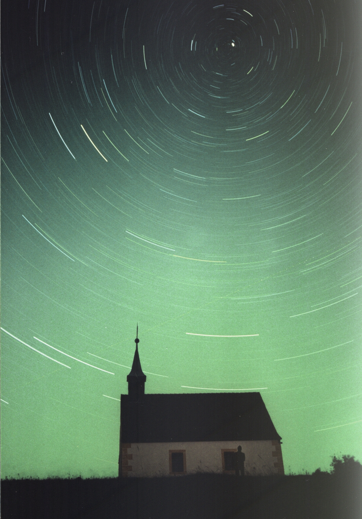 Nachtaufnahme vom sommerlichem nördlichen Sternenhimmel. Standort: Ehrenbürg (Walberla), Belichtung ca. 45 min. Aufgenommen auf Farbfilm, mit 50mm